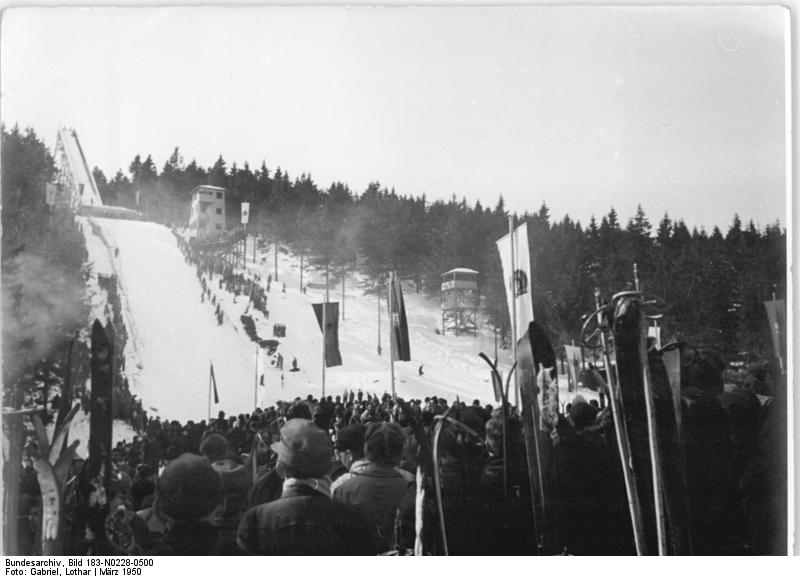 Wintersportmeisterschaften in Schierke März 1950 Spezialsprunglauf: UBz: Die Eckerlochschanze kurz vor Eröffnung des Wettbewerbes. Aufn. Illus-Gabriel 5665-50 11) Mlk